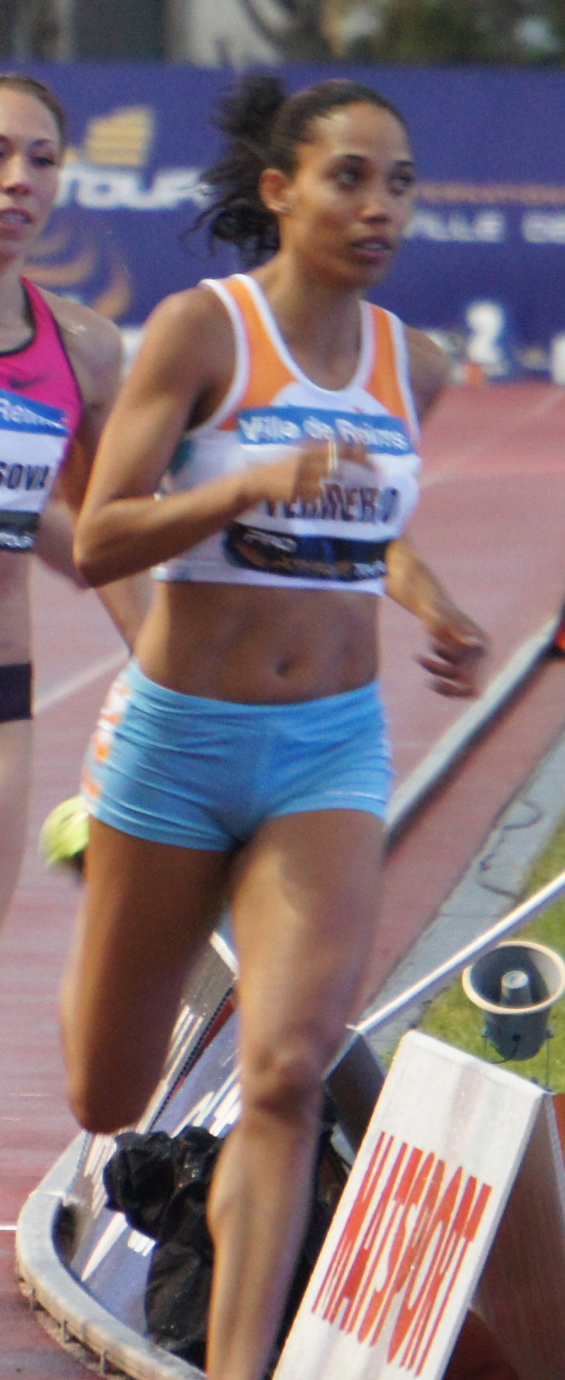 800 mètres féminin lors des Rencontres d'athlétisme de Reims 2013: Indira Terrero.